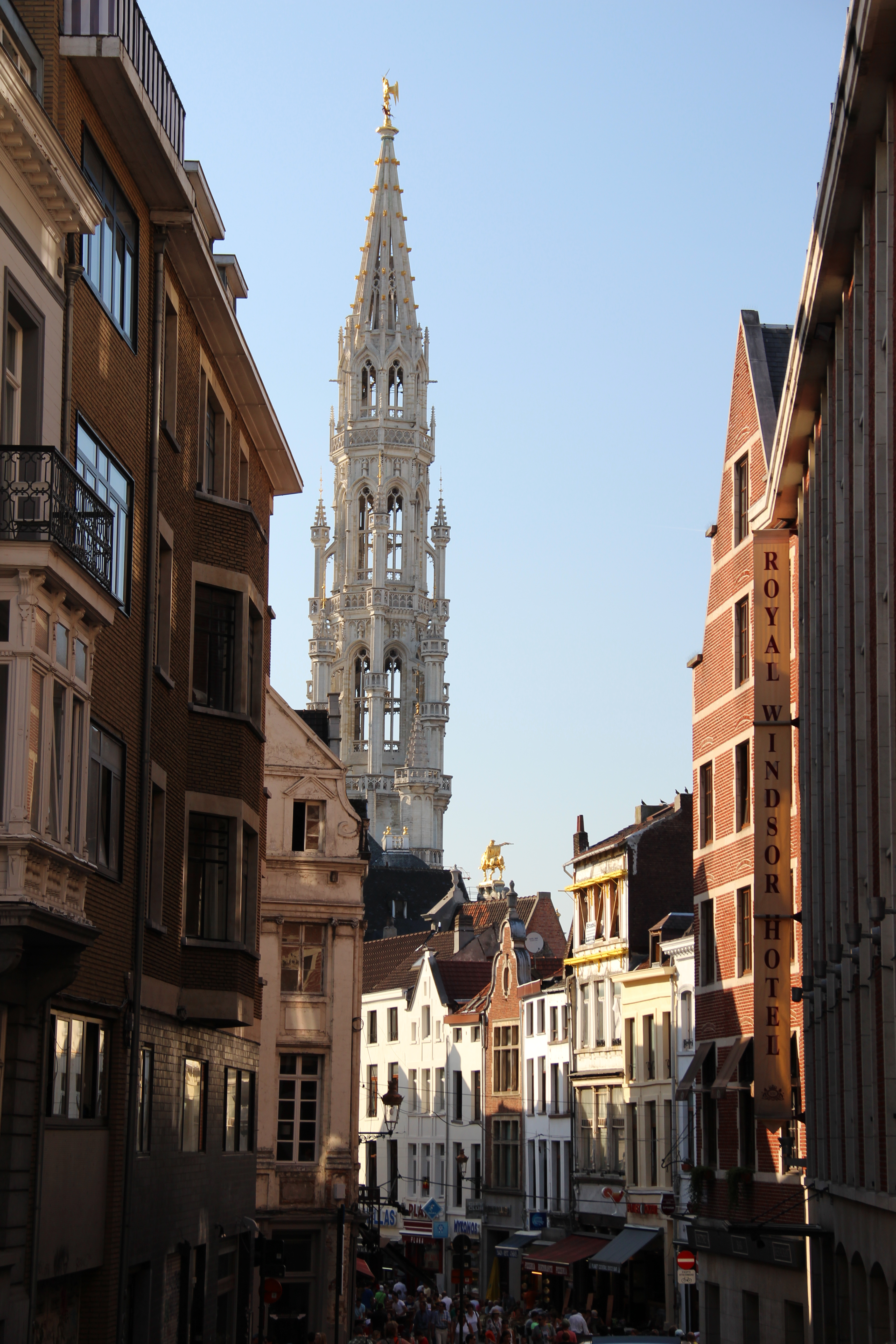 Zicht op stadhuis van Brussel en de Kaasmarkt vanuit de Kerstenmannekensstraat